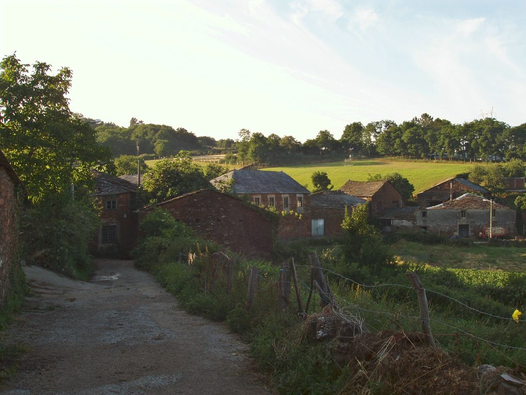 Vista de Fruxil